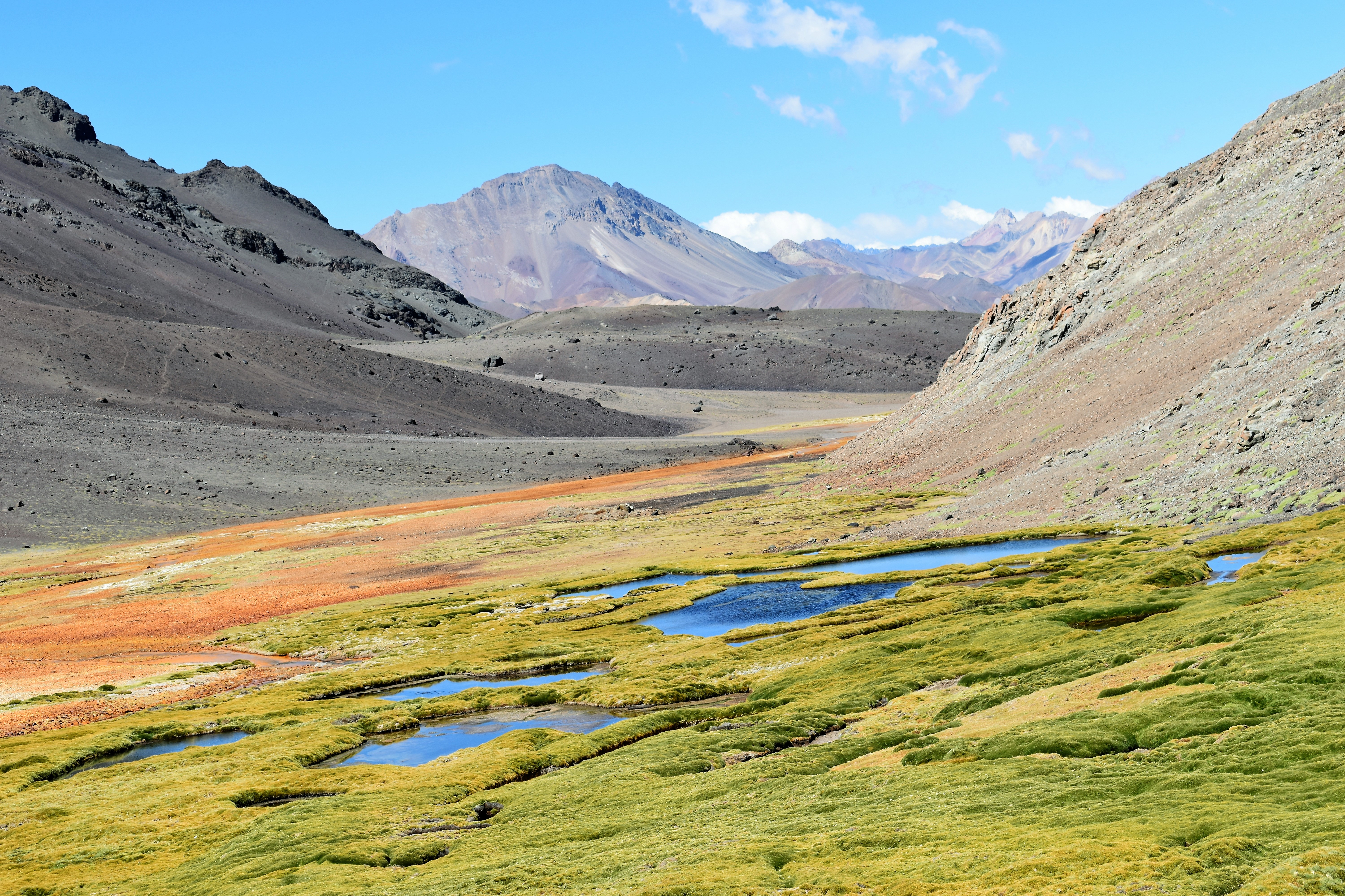 estero tributario del rio Rocin. Nace en el limite con argentina a 3900 m.s.n.m. en el limite entre la regio de Valparaíso y Coquimbo, en su nacimiento presenta glaciares de roca que alimentan el río rocin el cual es usado para regar áreas de cultivo del valle de Putaendo. Actualmente dichos glaciares estan amenazados por proyectos mineros.